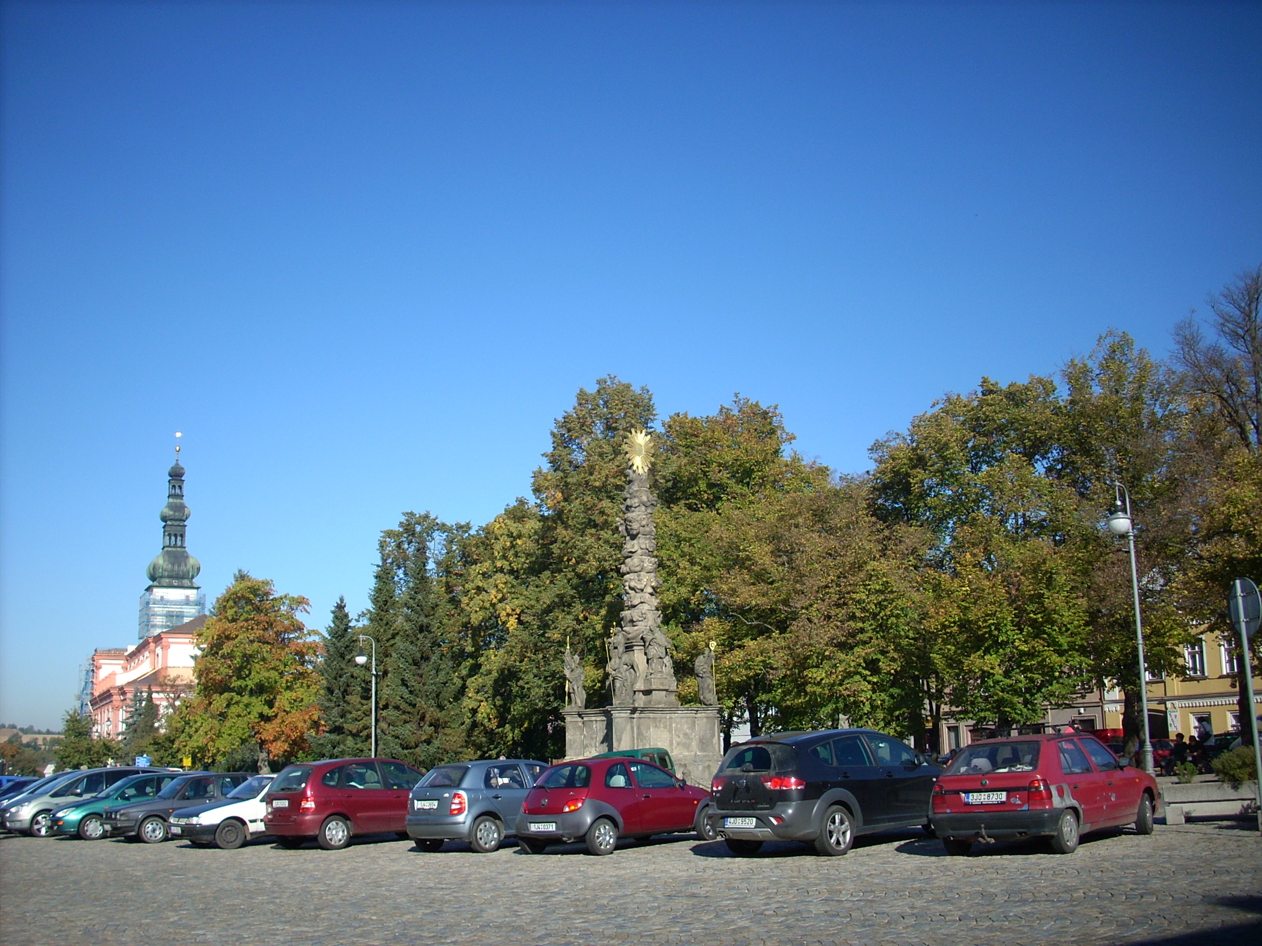 Polná, Husovo namesti